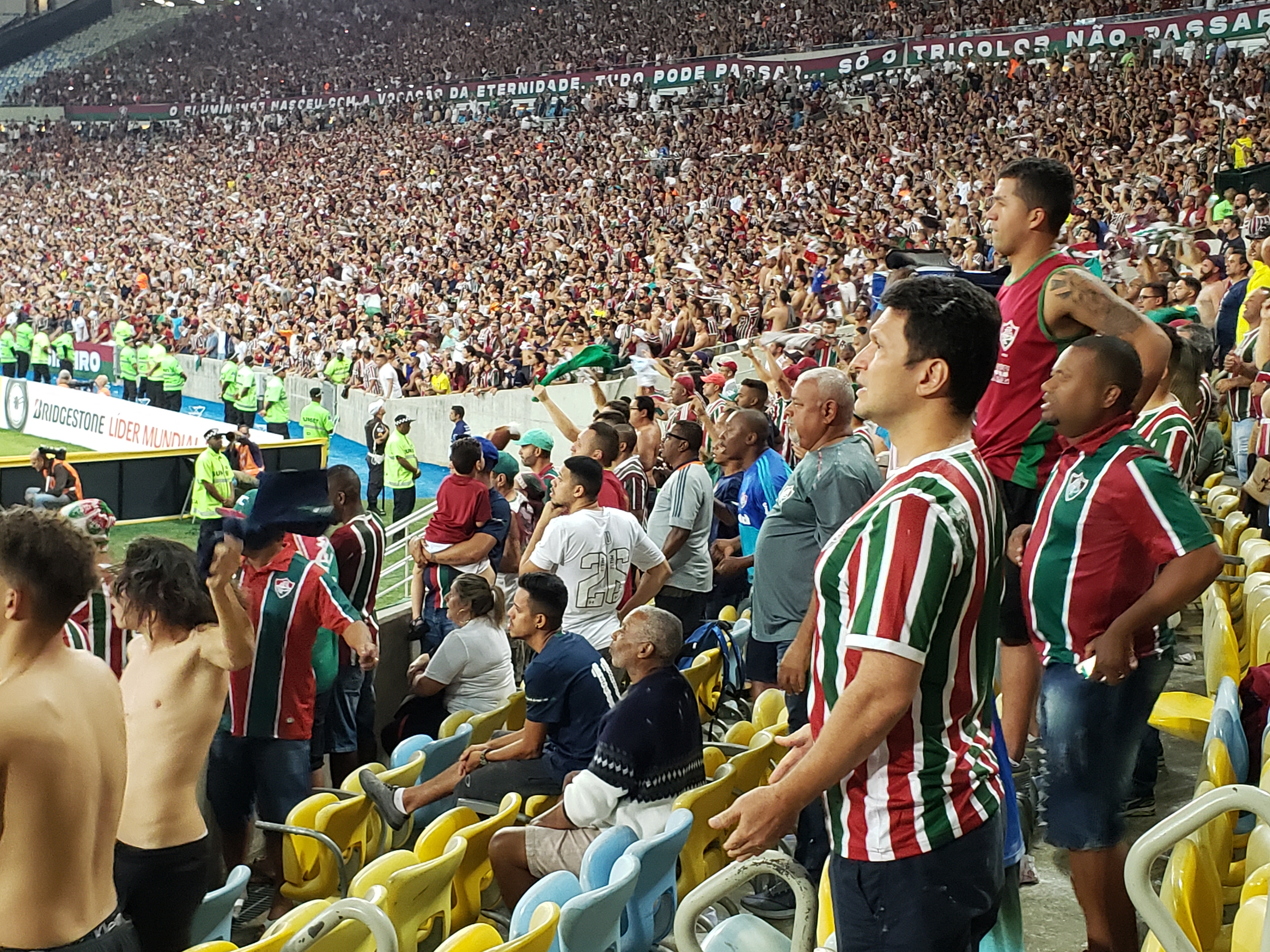 Torcida do Fluminense Football Club contra o Corinthians na Copa Sul-Americana de 2019, partida disputada no Maracanã em 29/08/2019 e que terminou empatada por 1 a 1.